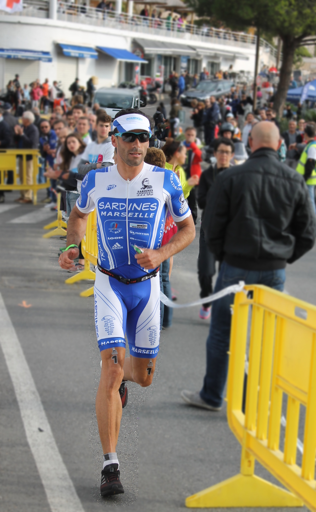 Sylvain Sudrie Triathlon de Cassis 2016